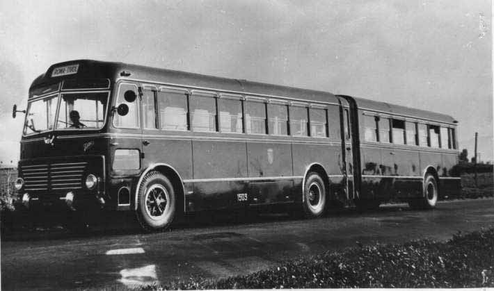 Autosnodato OM Super Orione Viberti, matricola 1503 dell'ATAC, tabellato ROMA-TIVOLI